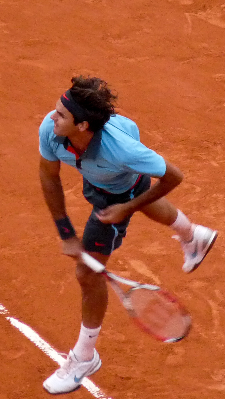 Roger Federer against Juan Martín del Potro in the 2009 French Open semifinals